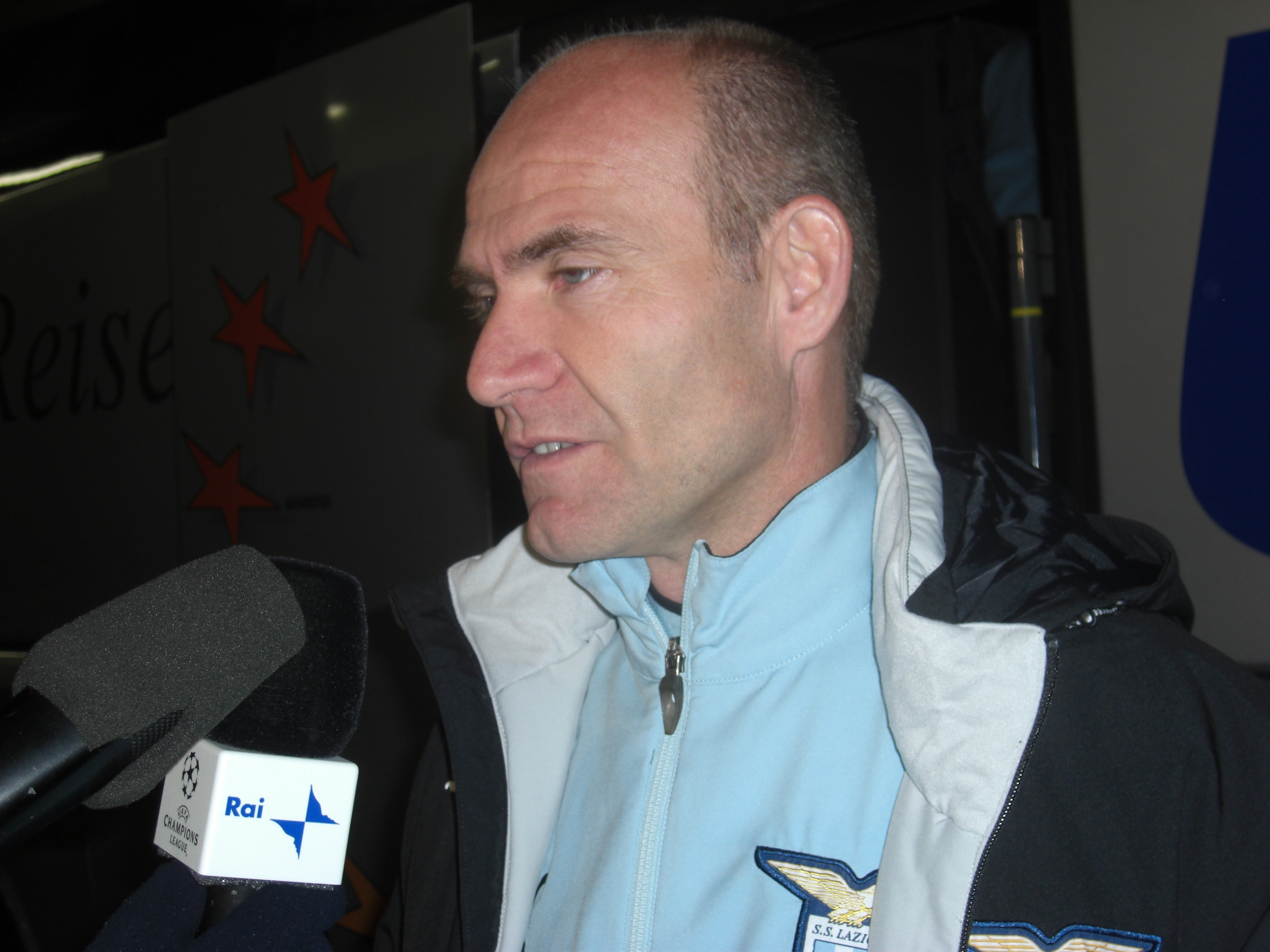 Marco_Ballotta